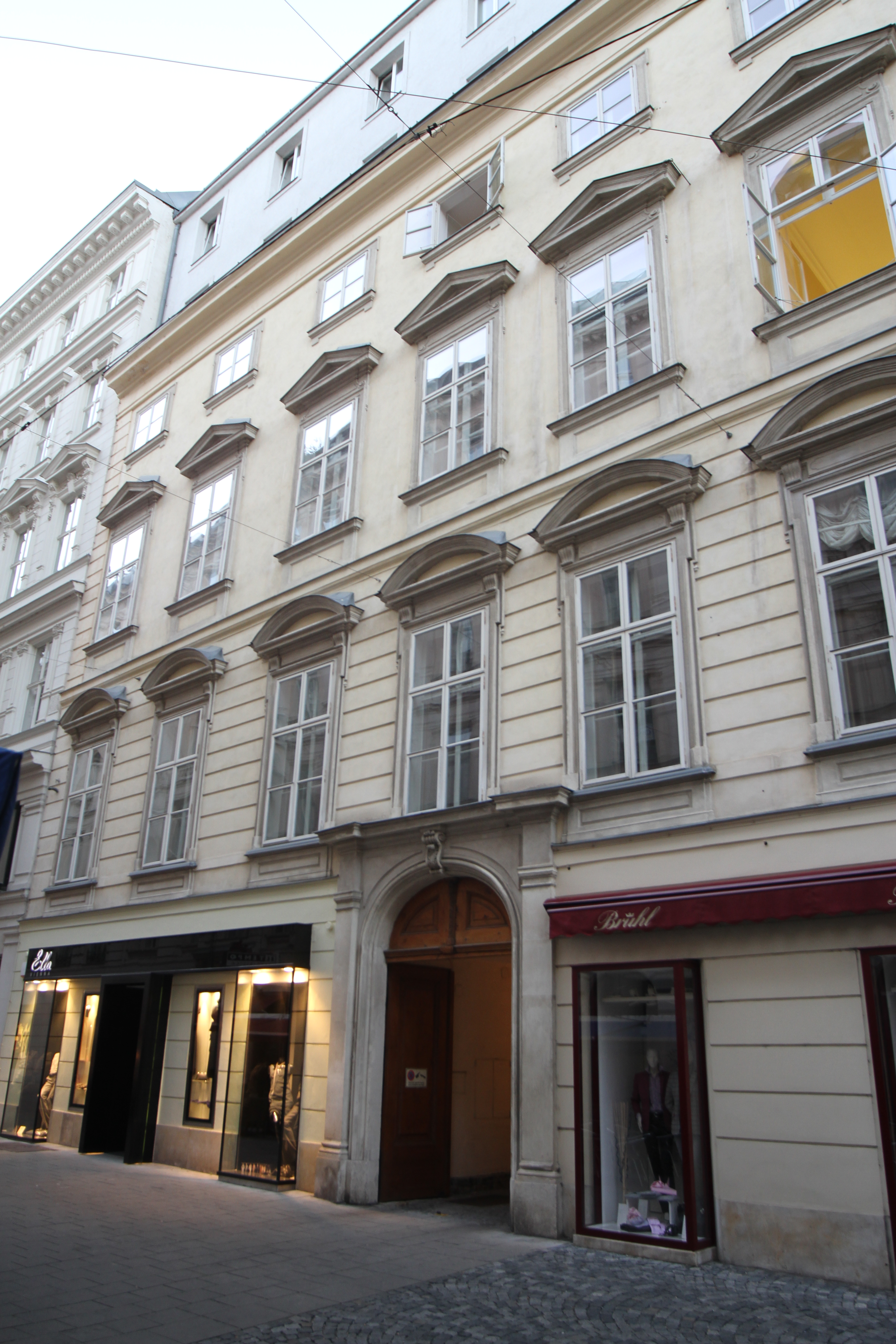 Sog. Kaiserhaus, Palais Lamberg - Sprinzenstein